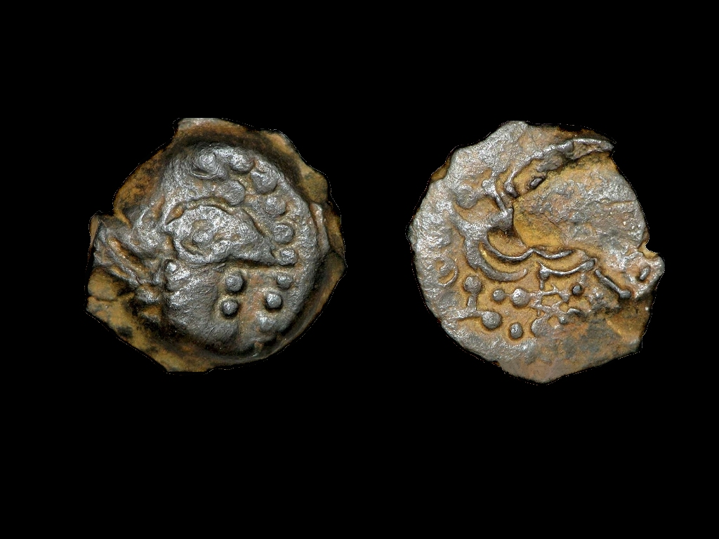 Tribu des Bellovaques. Monnaie de bronze à l'oiseau, “type de Vendeuil-Caply” vers 40-20 AC.